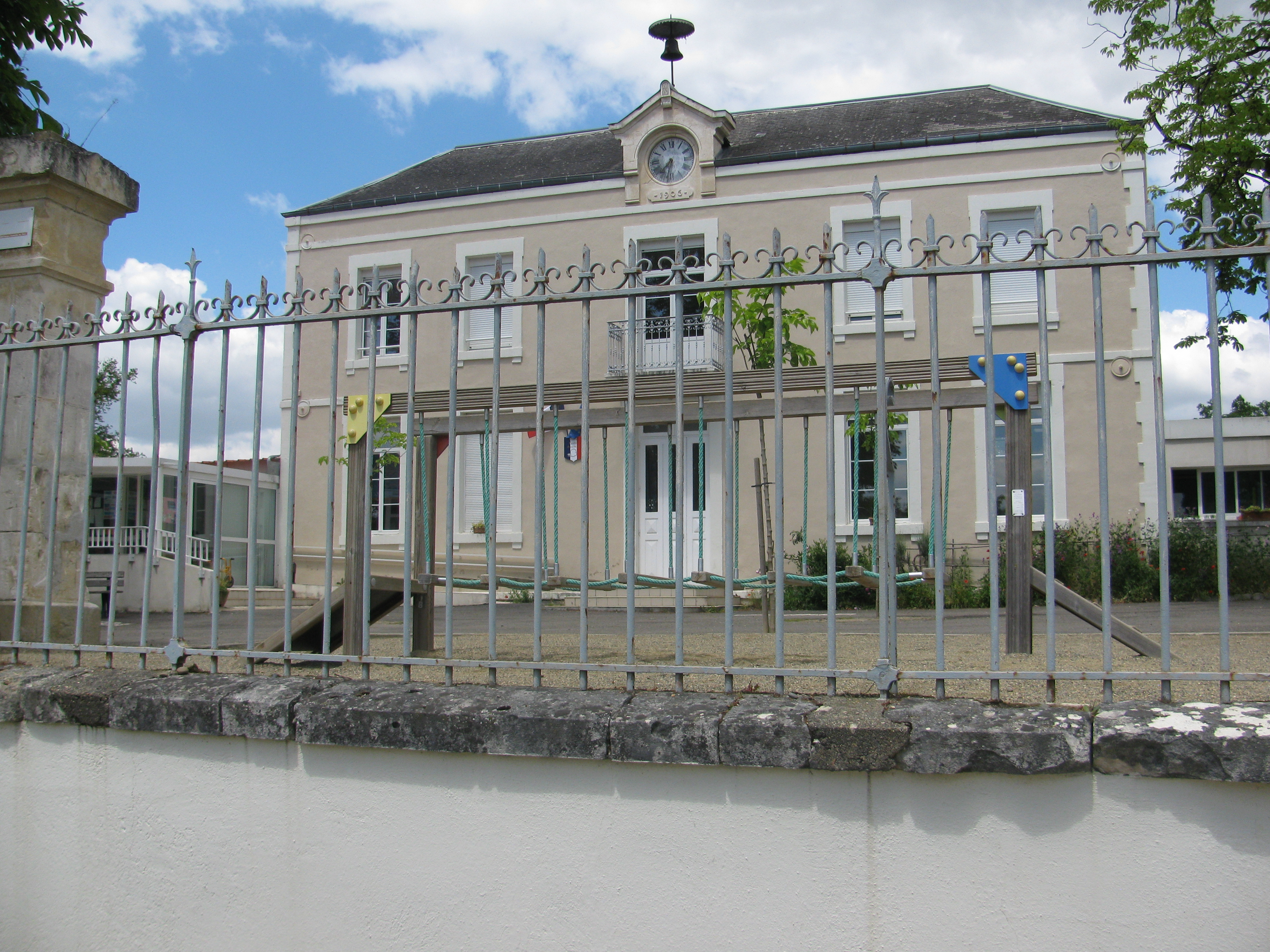 école de Lannux